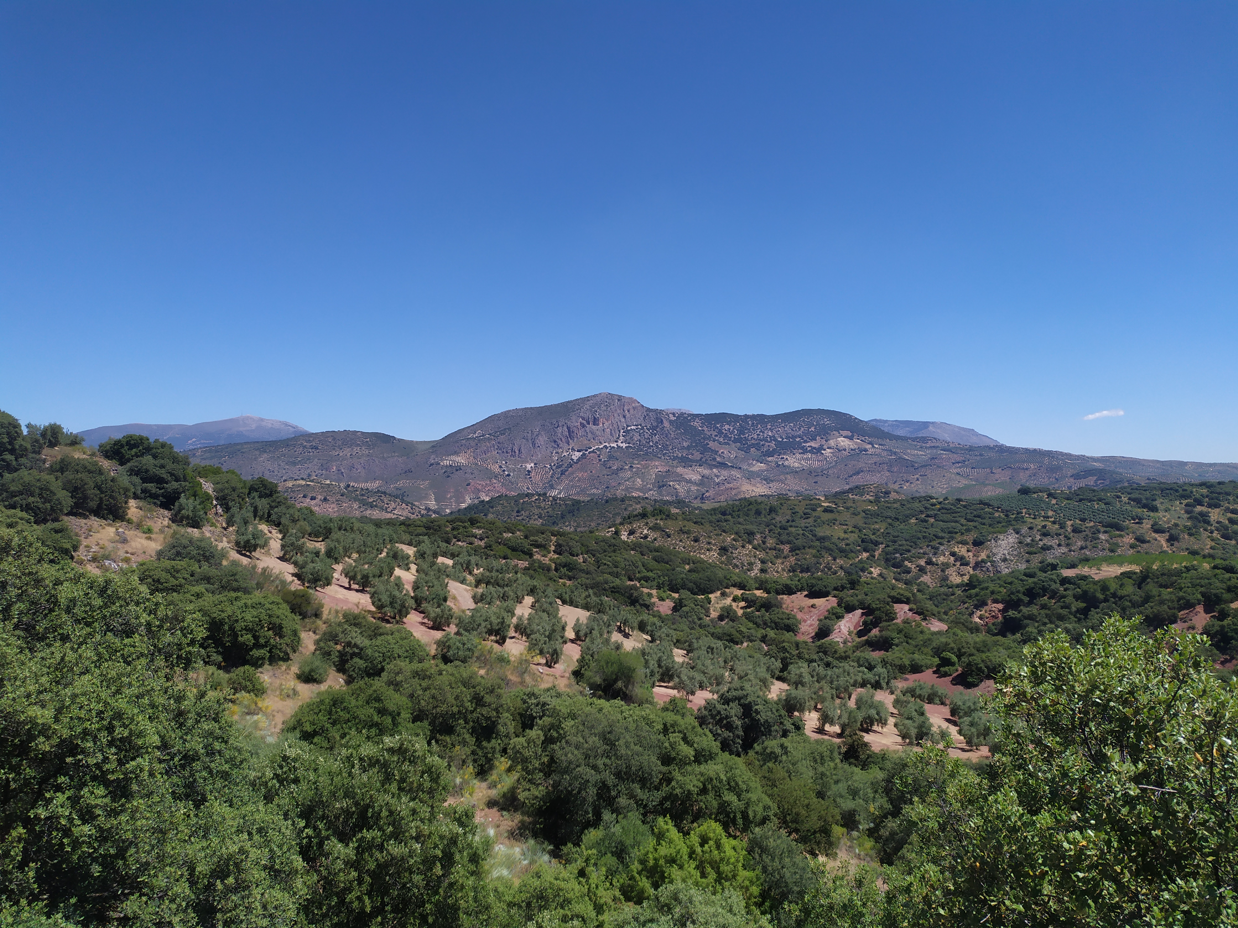 Pico de la Laguna y las Borregueras en Huelma, estribaciones de SIerra Mágina. Vista desde la JV-3221